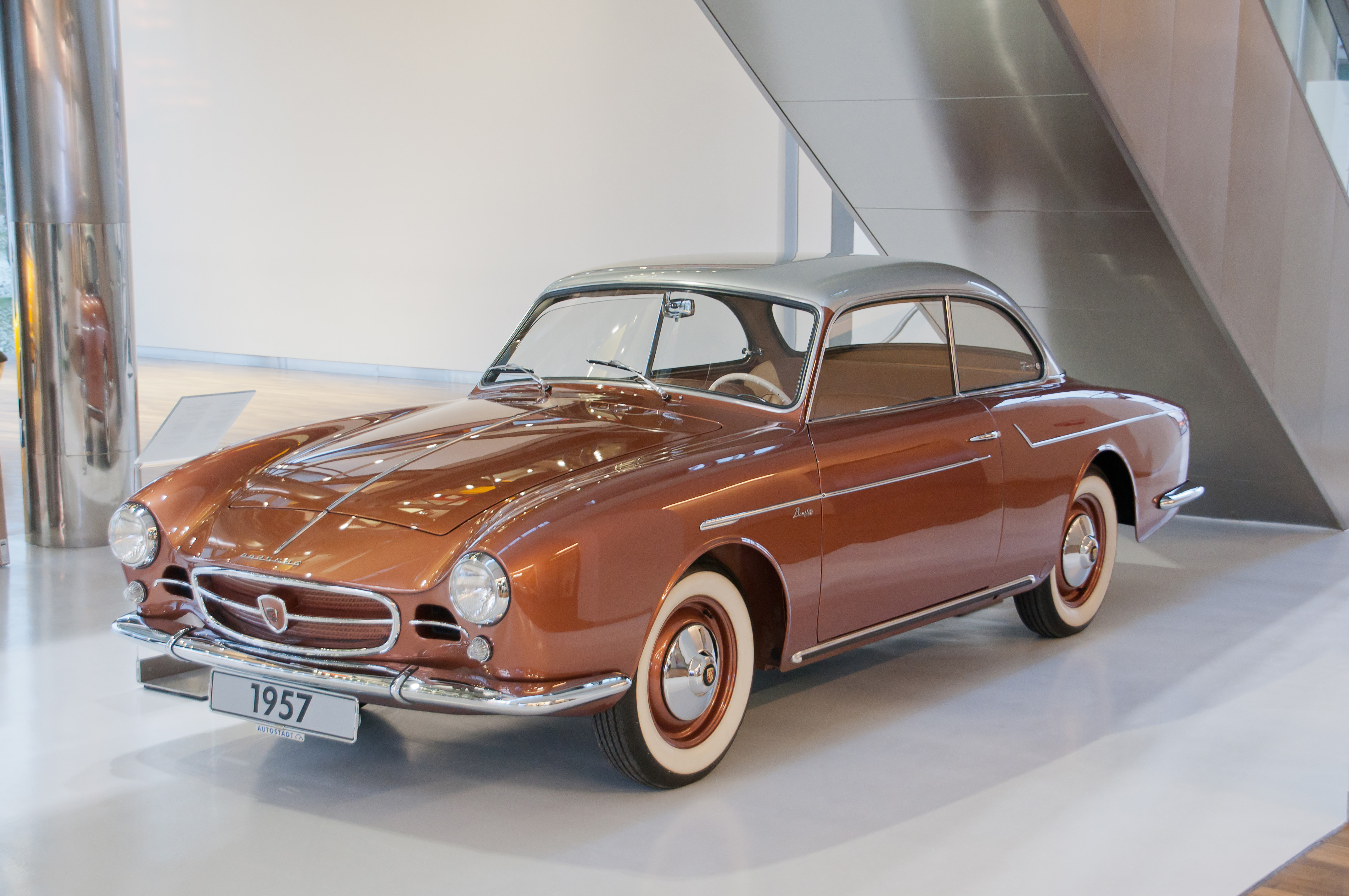 Autostadt Wolfsburg, ein Volkswagen Porsche Beutler, Baujahr 1957